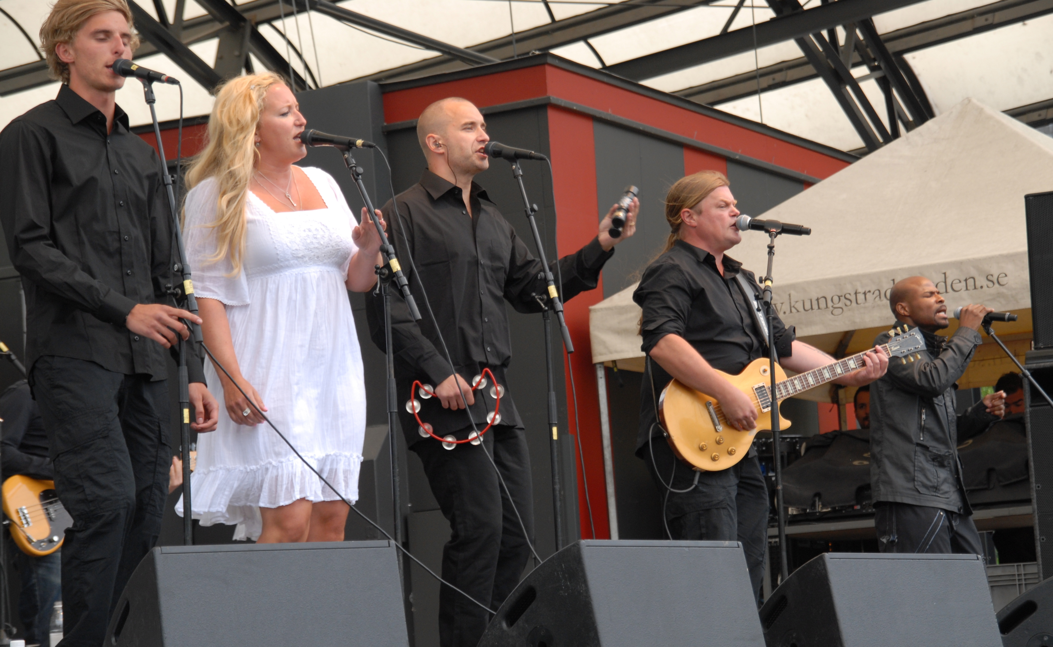 Urban Tribe i Kungsträdgården i Stockholm 3 juli 2011.